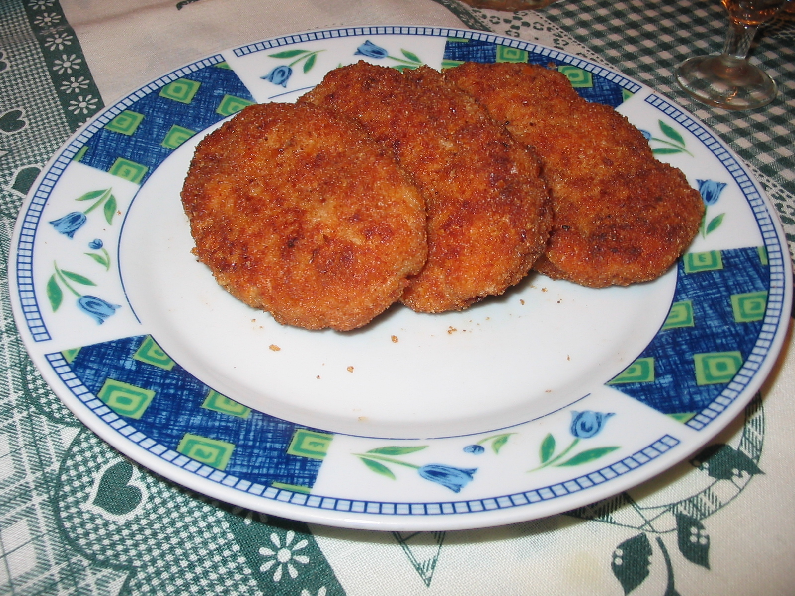 котлета (виріб із меленого м'яса, цибулі, хліба та прянощів, запанірований в мелених сухарях та обсмажений на жирі)